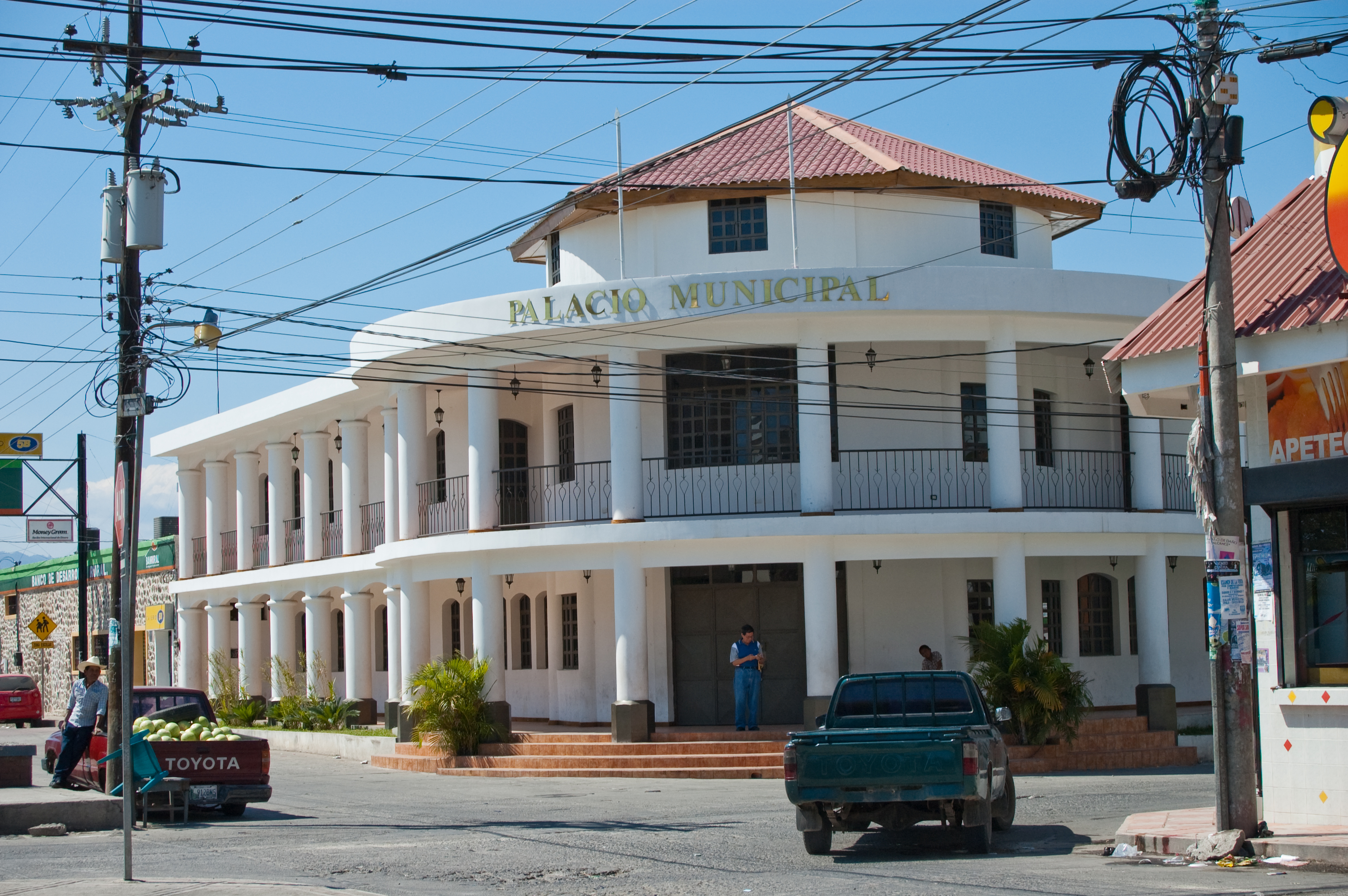 El palacio municipal de Ipala.